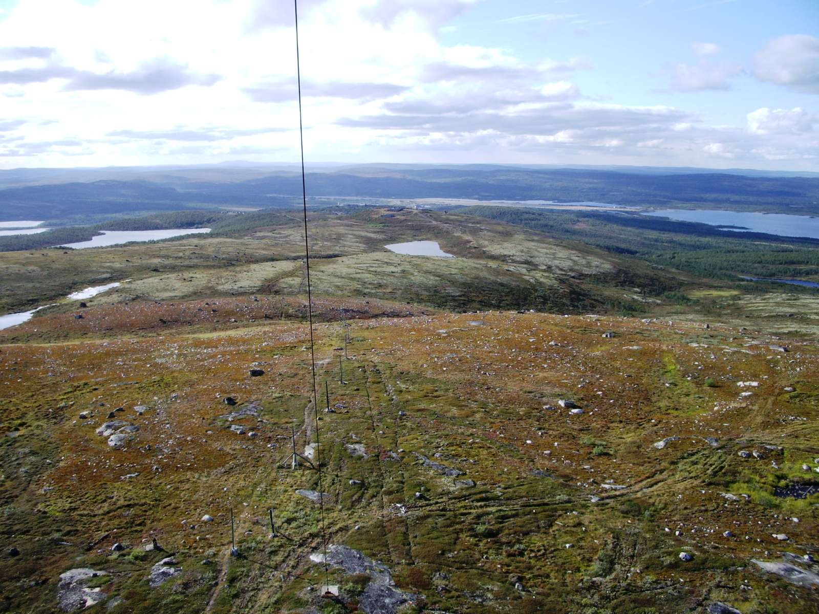 Вид с мачты в направлении н.п. Килпъявр